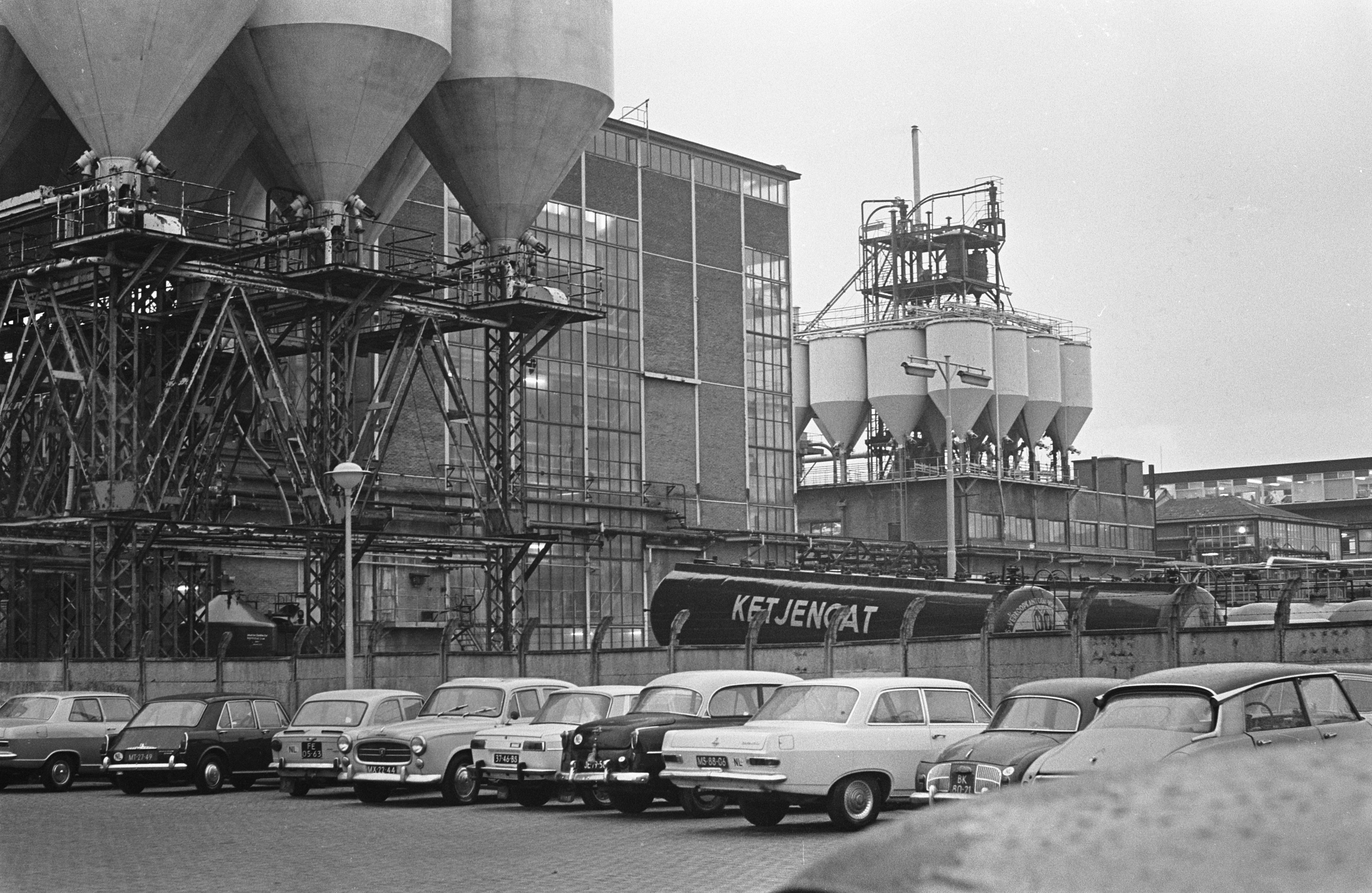 Collectie / Archief : Fotocollectie Anefo Reportage / Serie : [ onbekend ] Beschrijving : Fabriek Ketjen Datum : 17 februari 1967 Locatie : Amsterdam, Noord-Holland Trefwoorden : chemie, fabrieken, industrie Persoonsnaam : Ketjen Fotograaf : Jongerhuis, Pieter / Anefo Auteursrechthebbende : Nationaal Archief Materiaalsoort : Negatief (zwart/wit) Nummer archiefinventaris : bekijk toegang 2.24.01.05 Bestanddeelnummer : 920-0841